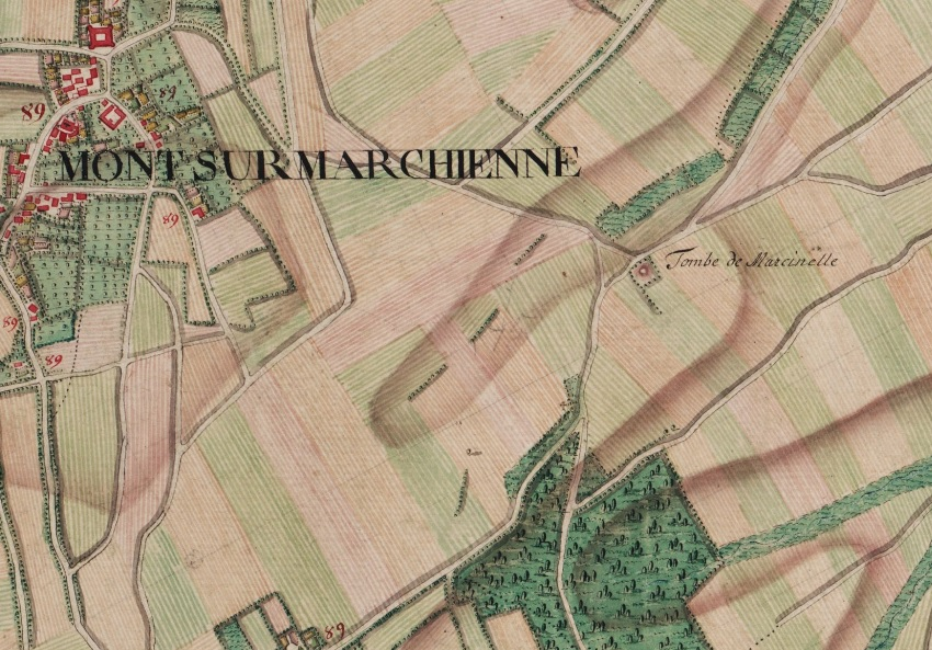 Extrait de la carte de Ferraris n° 82B